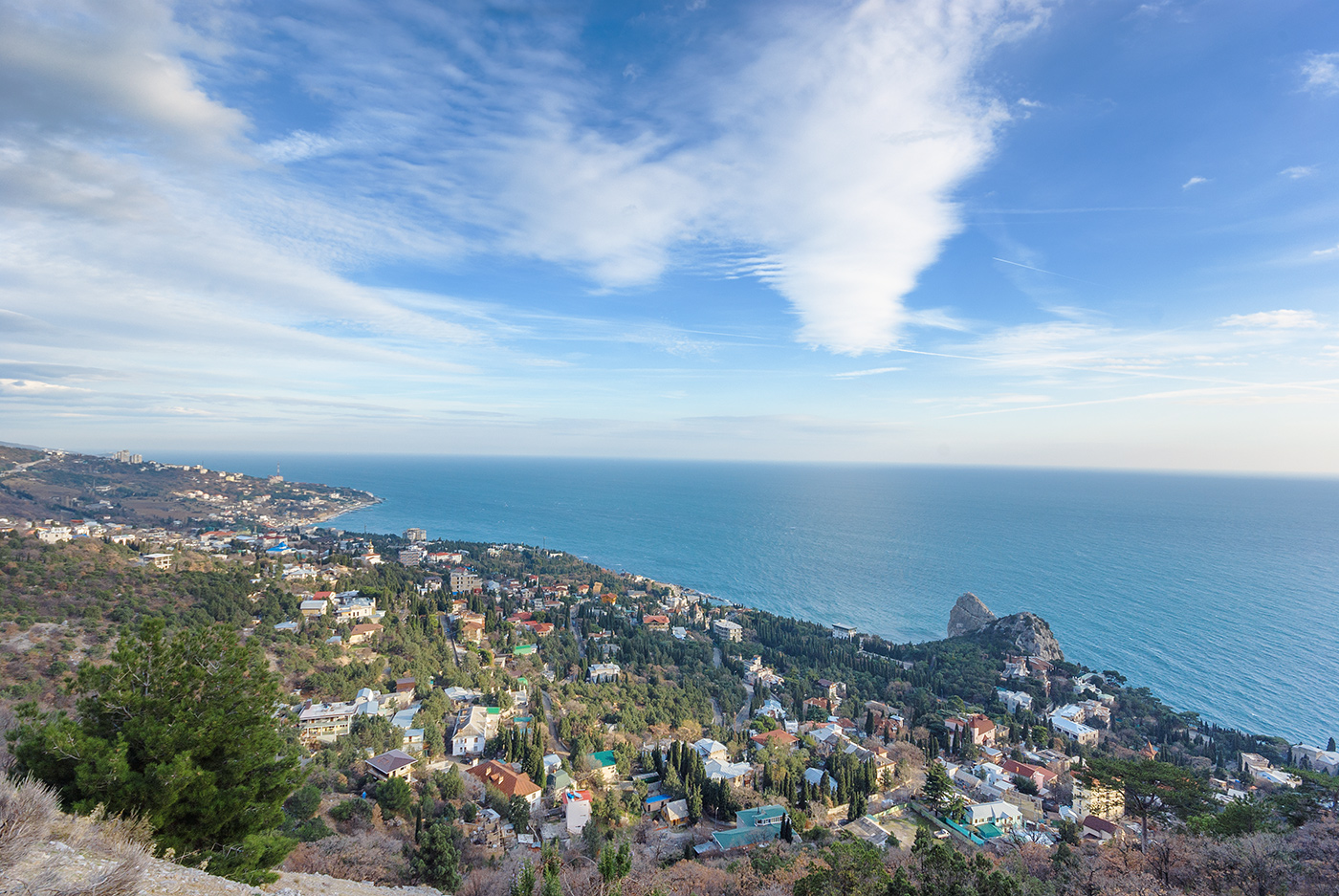 ПАК біля скелі Діва та г. Кішка, м. Ялта, сел. Сімеїз